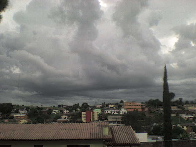 Panorama do bairro José Bonifácio, em Erechim, Rio Grande do Sul